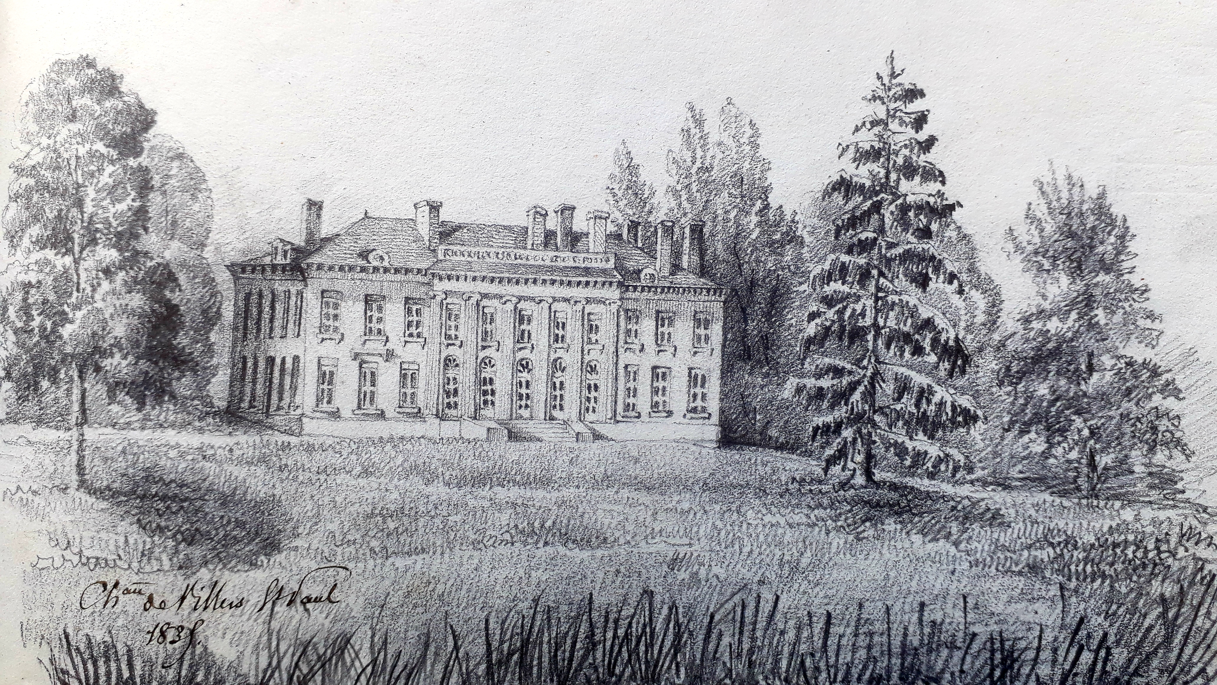 Dessin du Château de Villers-Saint-Paul en 1835 (carnet de dessin, famille Neuilly-Barberey)